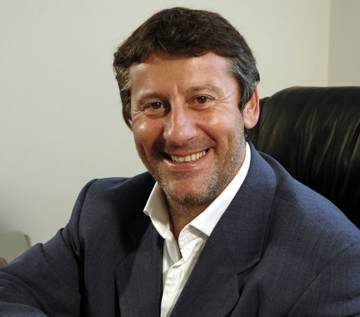 Psicologo, Psicoterapeuta, Direttore della Scuola di Specializzazione in Psicoterapia Breve Strategica e della Scuola di Comunicazione e Problem Solving Strategico di Arezzo